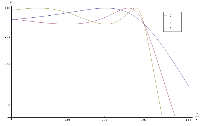 Loglog-graf av Chebyshevfilter (lågpass) av ordningarna 2, 3 och 4.